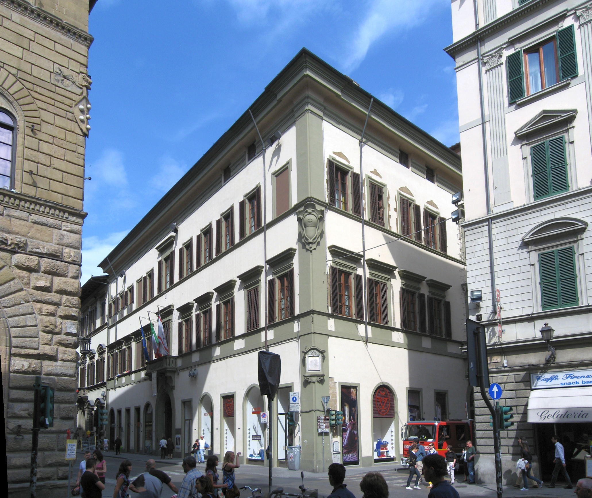 Consiglio regionale della Toscana at via Cavour 2 in Florence.